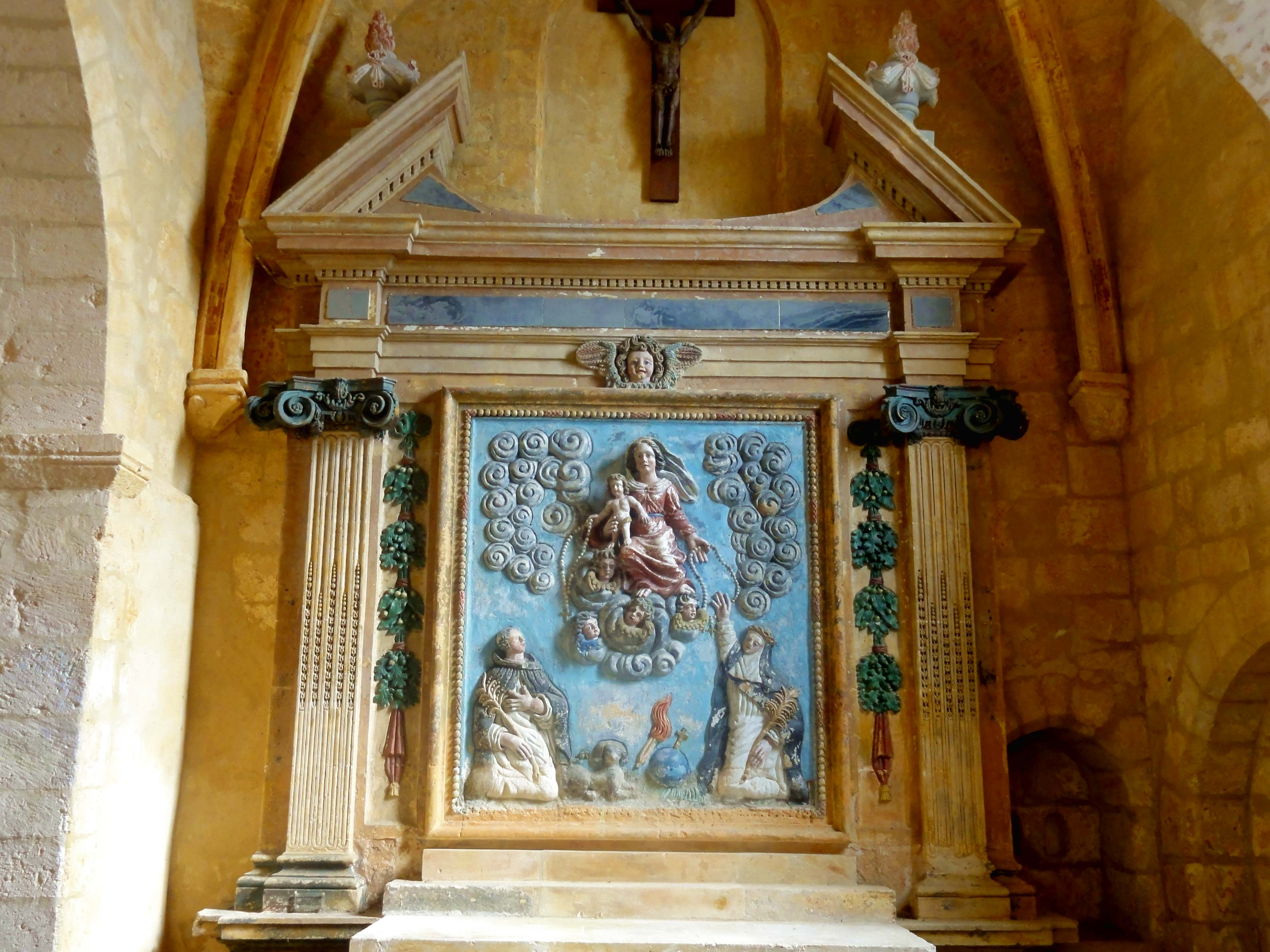 Croisillon sud, retable la Donation du Rosaire.